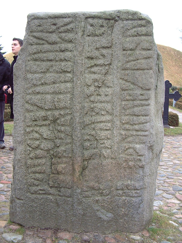 Kleiner und älterer Runenstein von Jelling mit der Aufschrift: "König Gorm errichtete diesen Gedenkstein zu Ehren seiner Frau Thorwi, Erneuerer/Stolz Dänemarks."